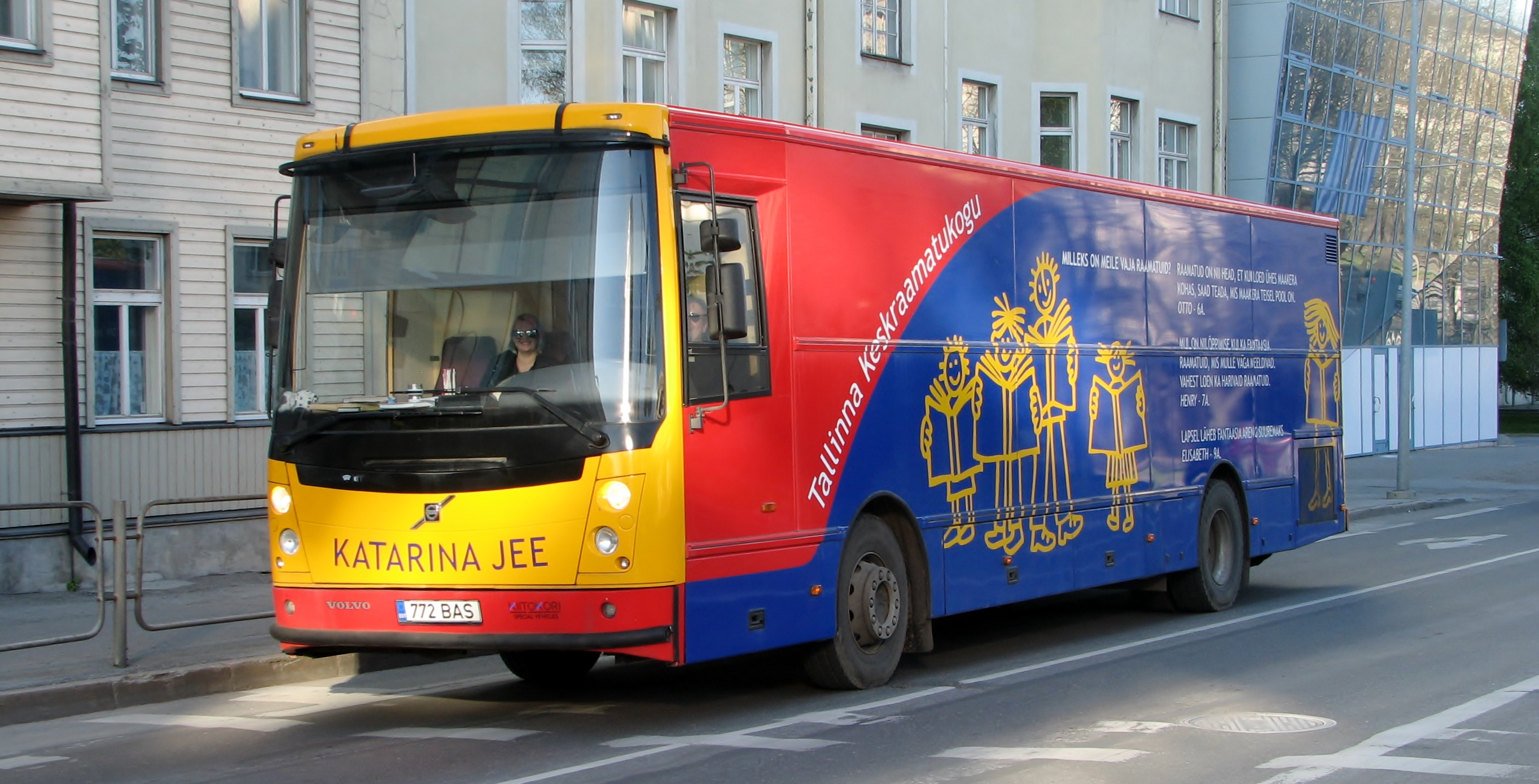 Raamatukogubuss Katariina Jee Liivalaia tänaval